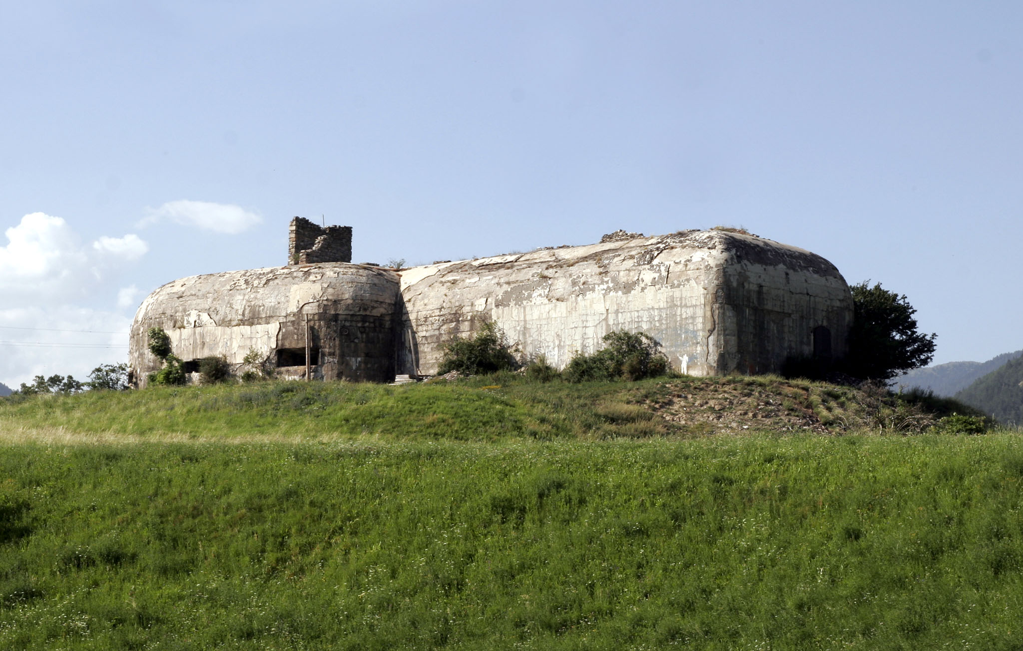 Bunker des Alpenwalls in der Nähe von Laatsch im Vinschgau (Südtirol)